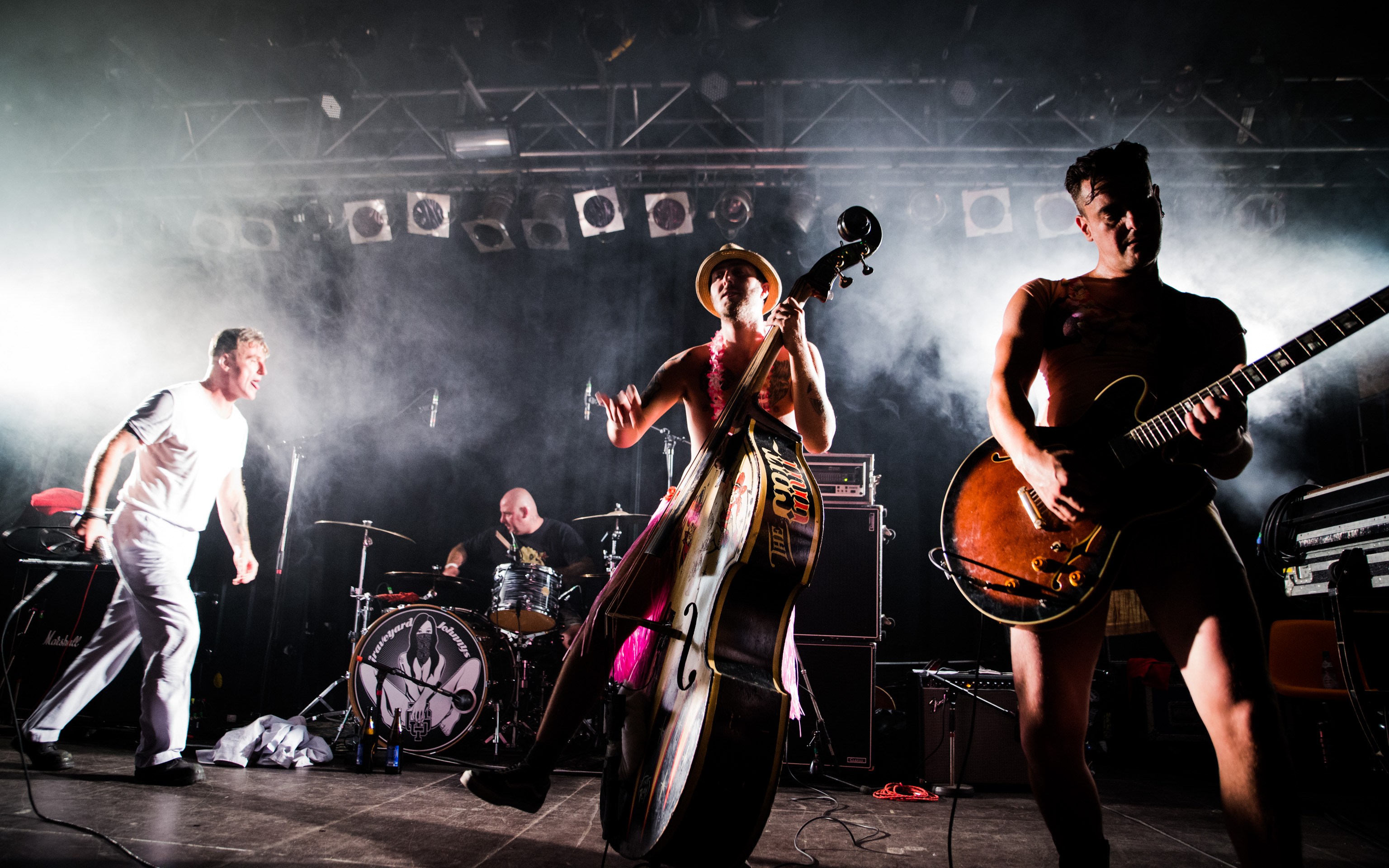 de